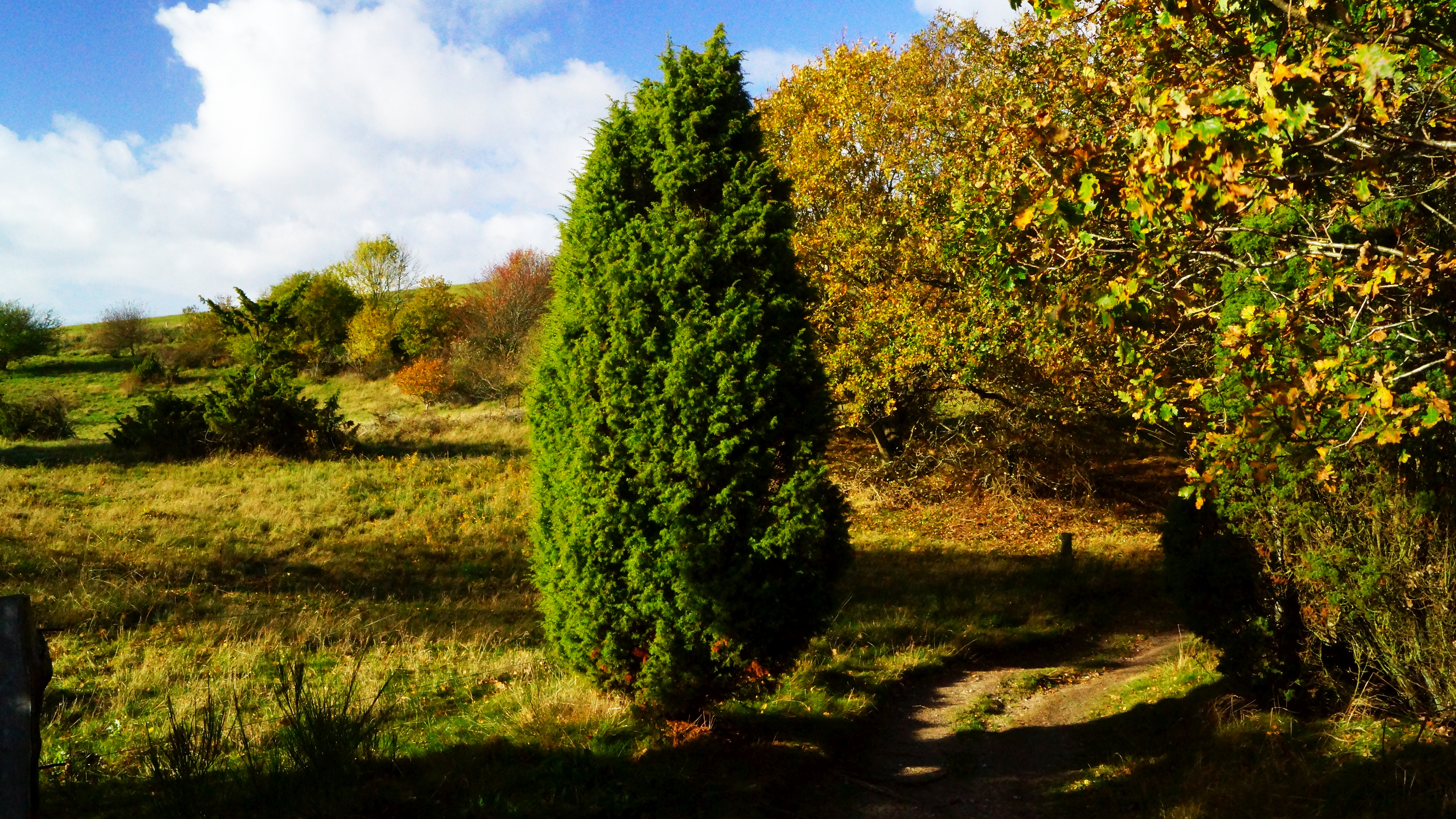 Den Italienske Sti SNS